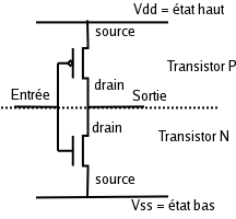 Auteur : Utilisateur:Manu_fred schéma d'un inverseur en technologie CMOS sous gfdl Utilisateur:Manu_fred